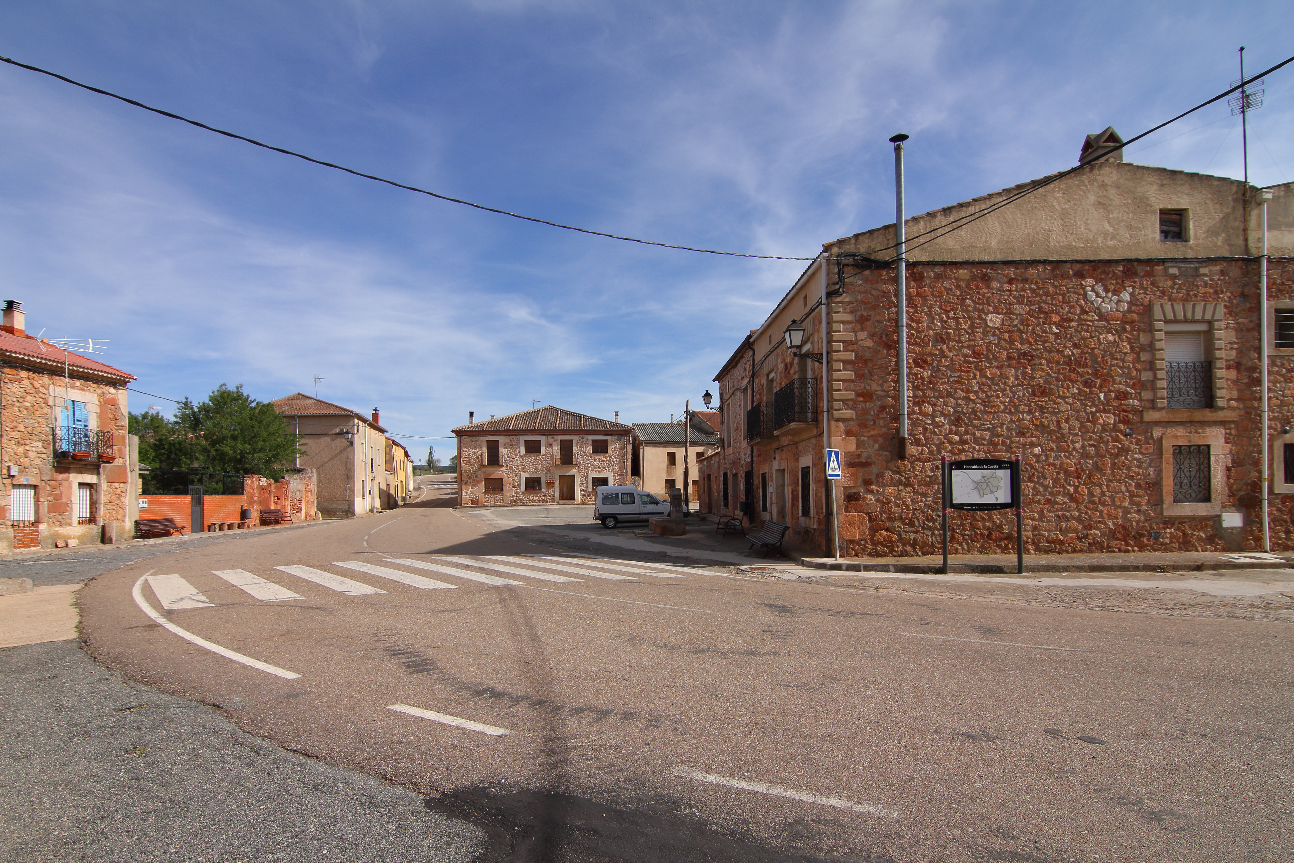 Honrubia de la Cuesta, 01, calle Real